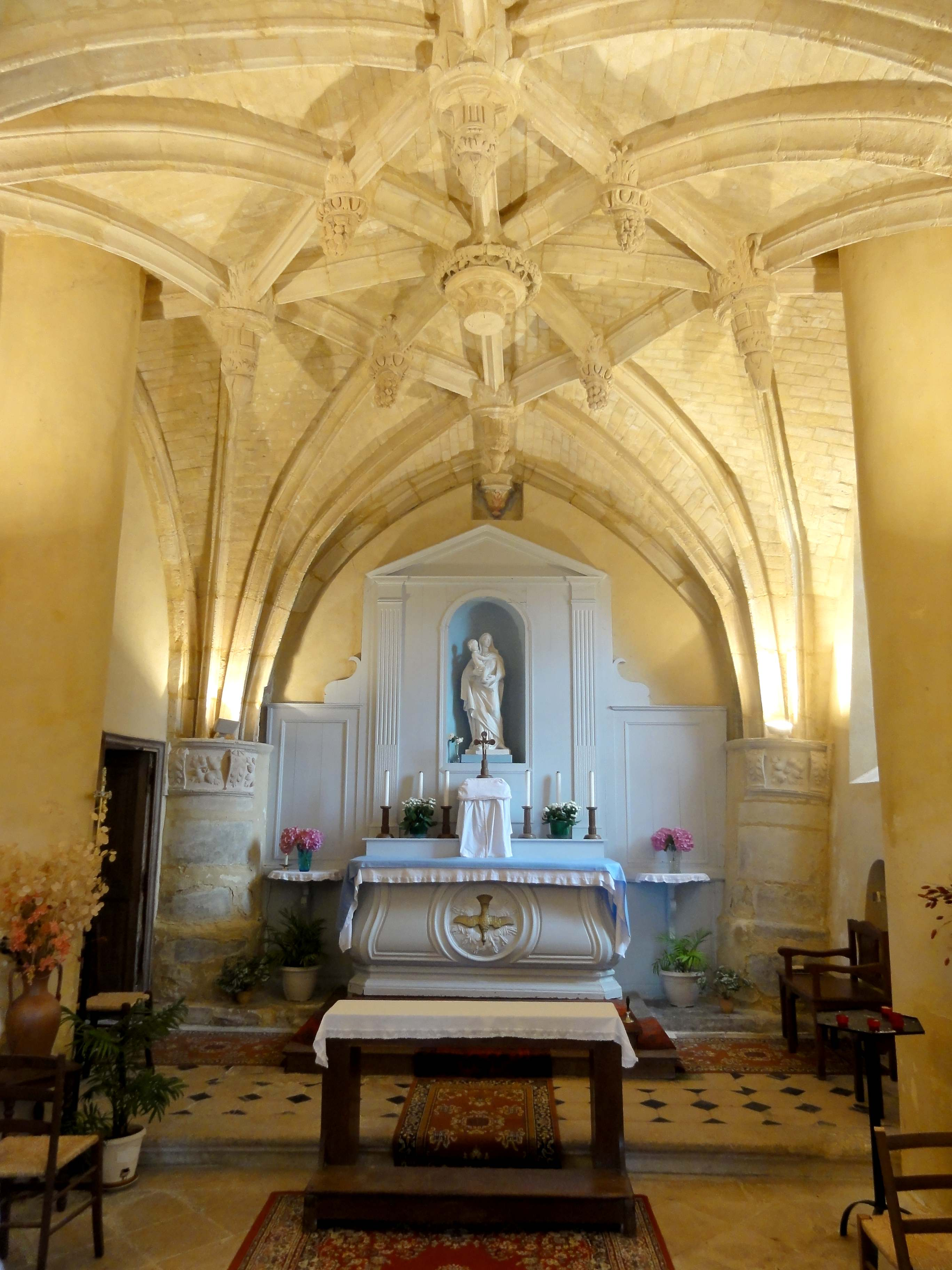 Chœur.